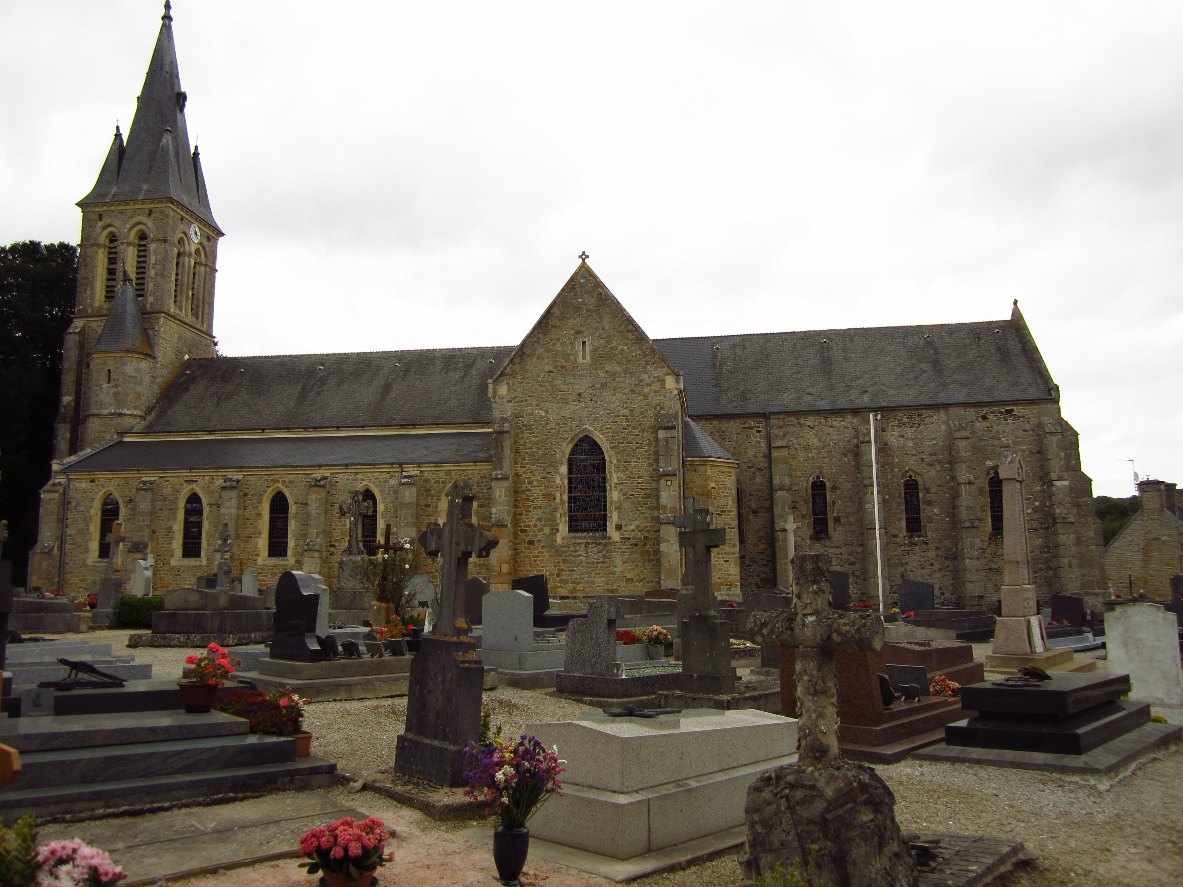 Église Notre-Dame du Vast